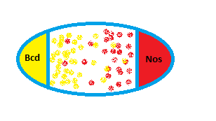 Gradiente de expressão dos mRNA dos genes nos e bicoid.